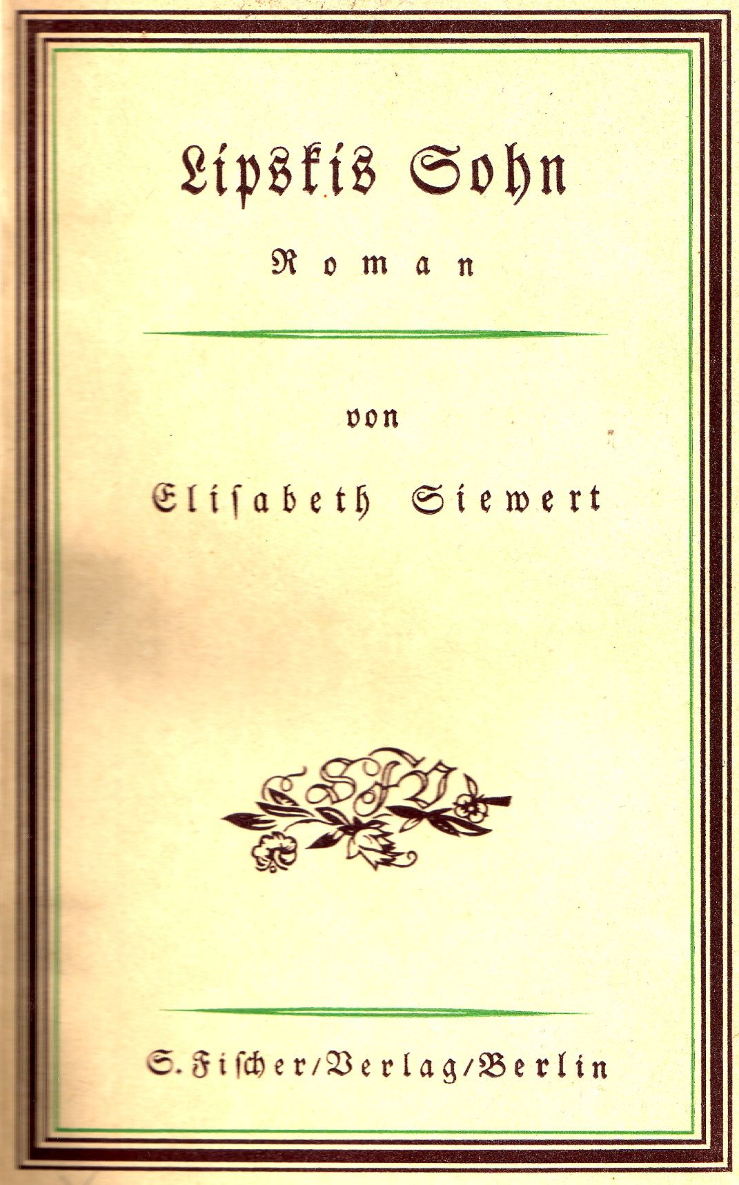 Cover of the novel Lipskis Sohn. Written by Elisabeth Siewert (1867–1930). S. Fischer Verlag, Berlin 1913.